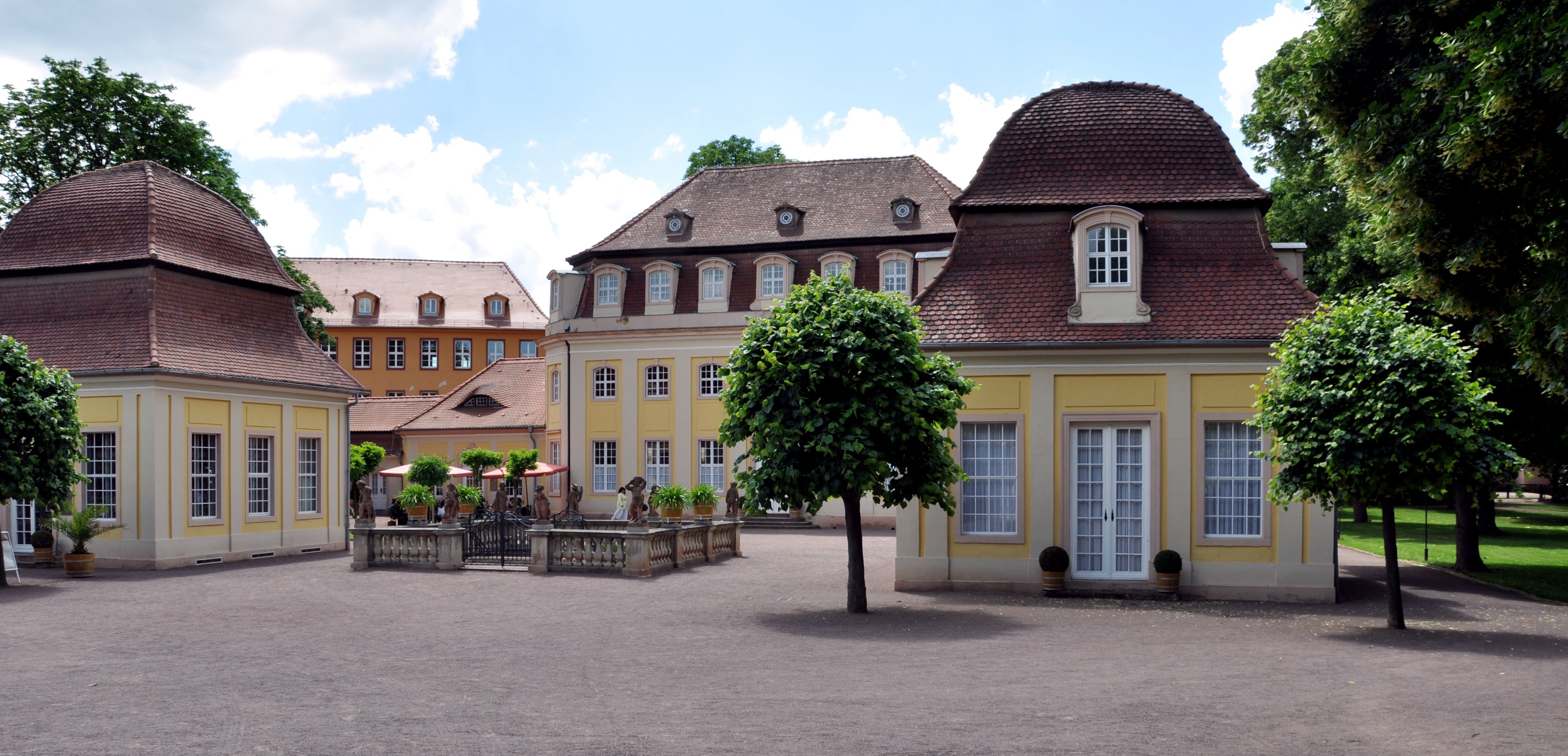 Bad Lauchstädt, Historische Kuranlagen